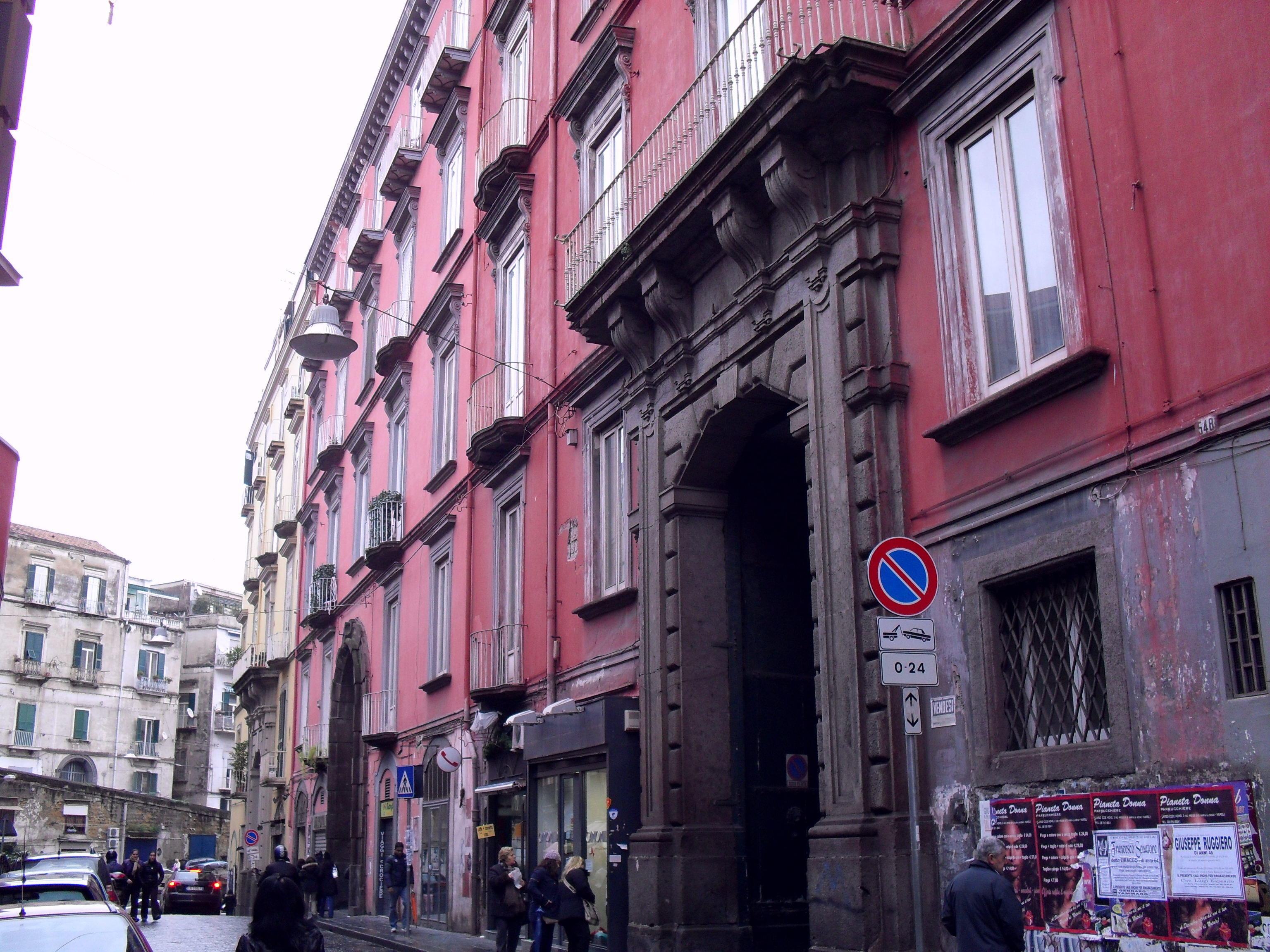 Palazzo Latilla in via Tarsia n. 31 (Napoli)